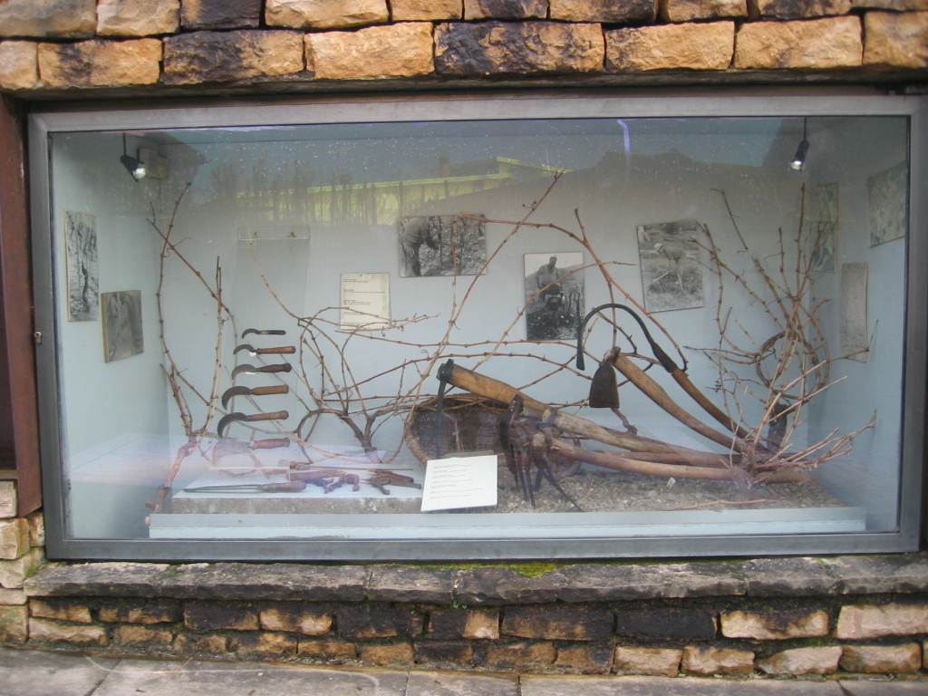 Chateau Pecaud - Musée de la viticulture - Arbois - Jura - France